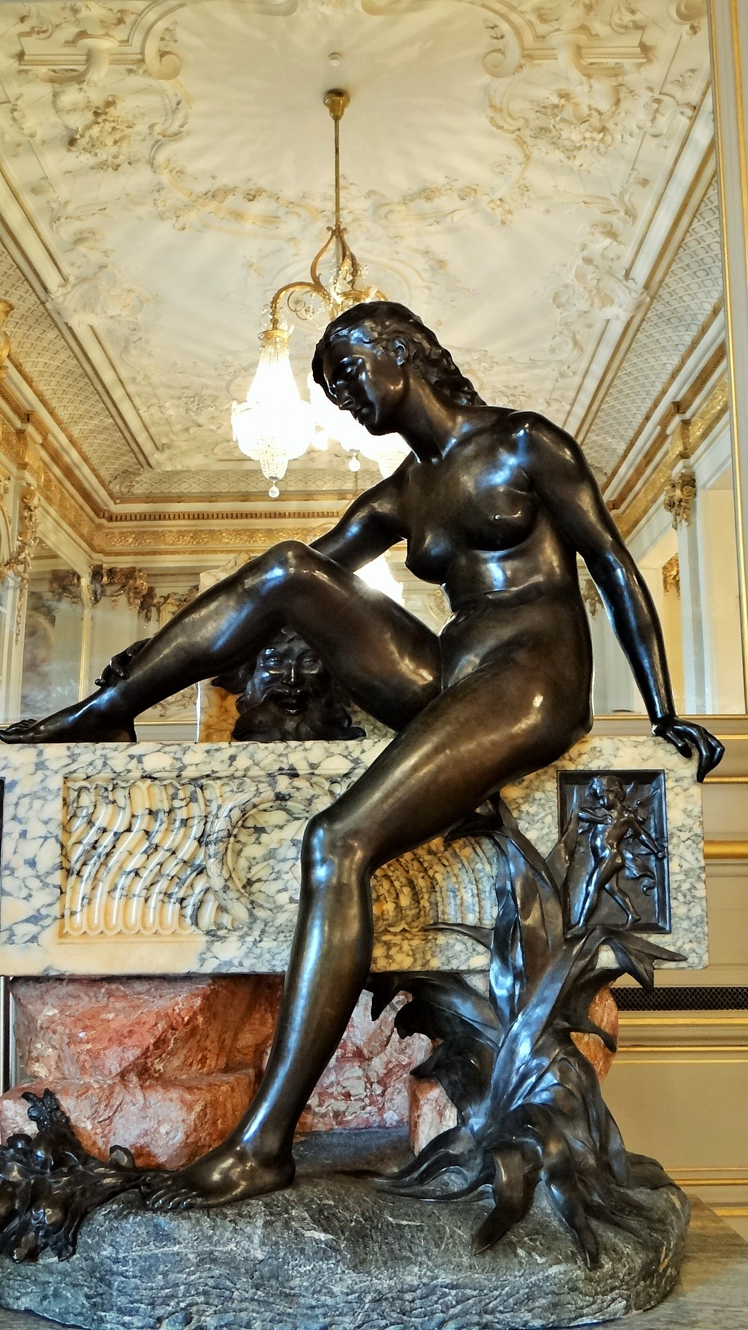 La Muse de la source, 1900, fonte, marbre, bronze, de Jean-Baptiste Hugues (Marseille, 1849-Paris, 1930) , ancienne salle de bal de l'Hotel d'Orsay, musée d'Orsay, Paris